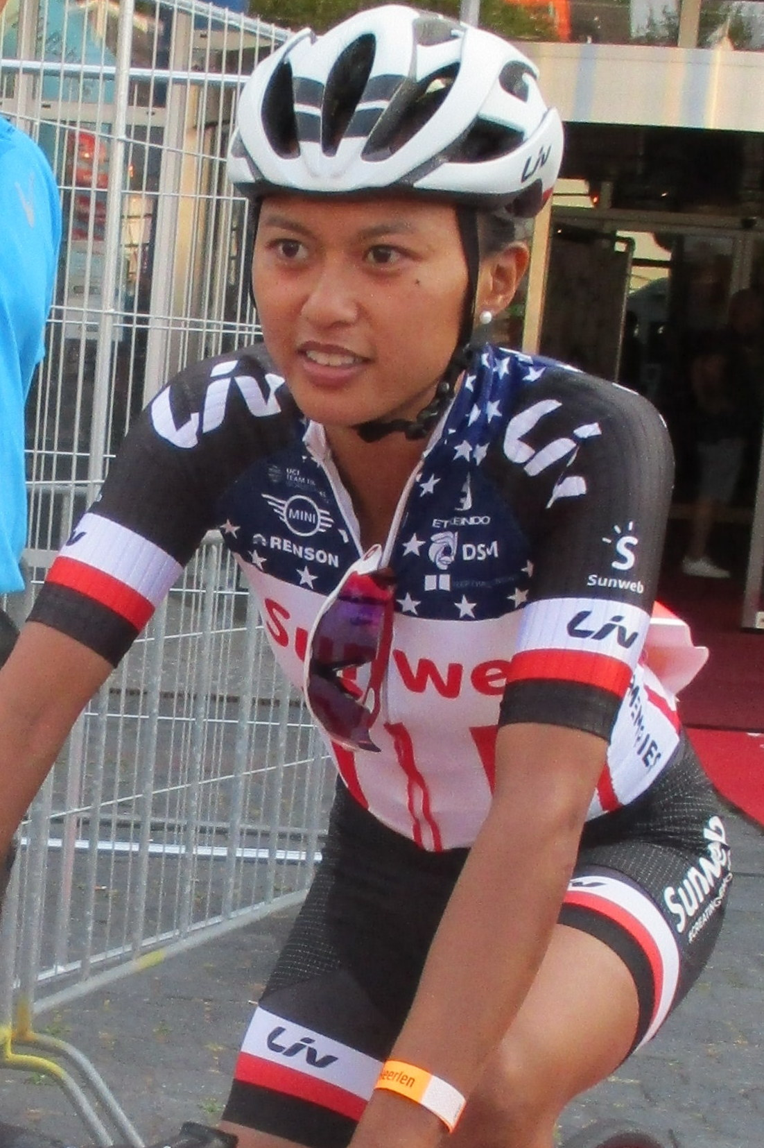 Criterium RaboRonde in Heerlen, Limburg, vrijdag 3 augustus 2018